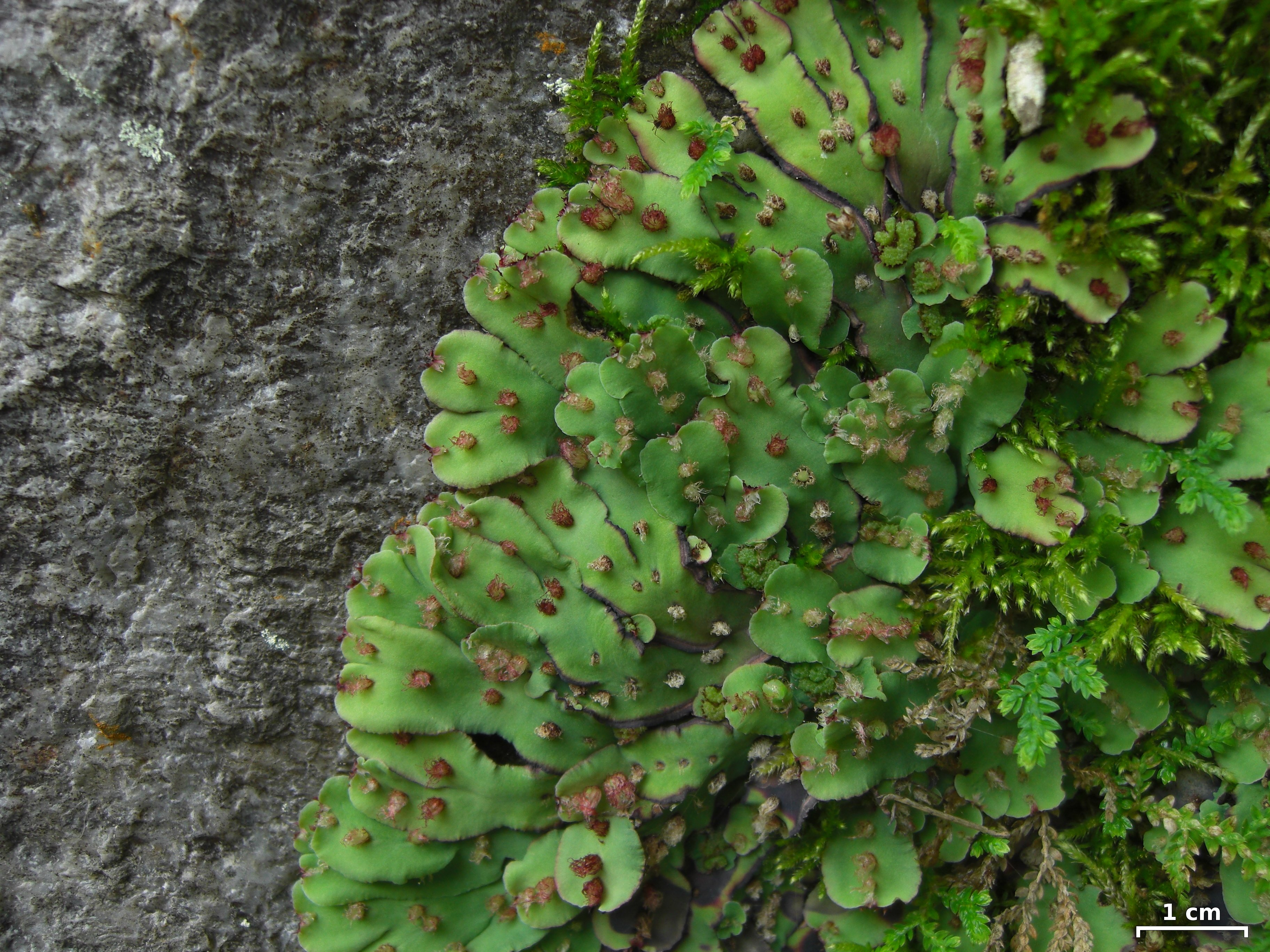 Machu Picchu, Peru, 20130123